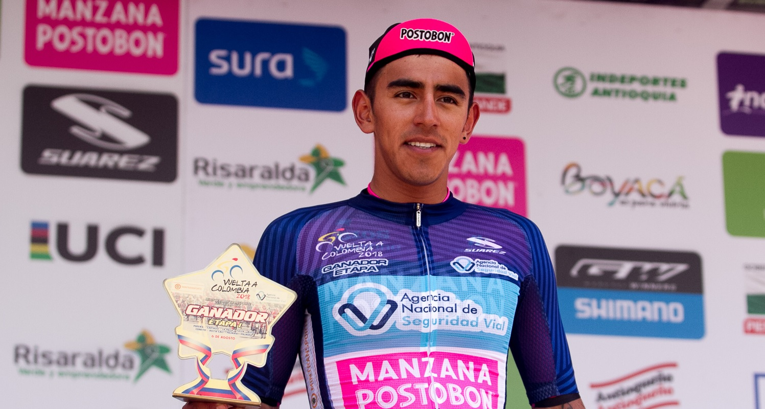 1.ª Etapa de la Vuelta a Colombia 2018 - Ciclista Juan Sebastián Molano - Podio Ganador de 1 Etapa